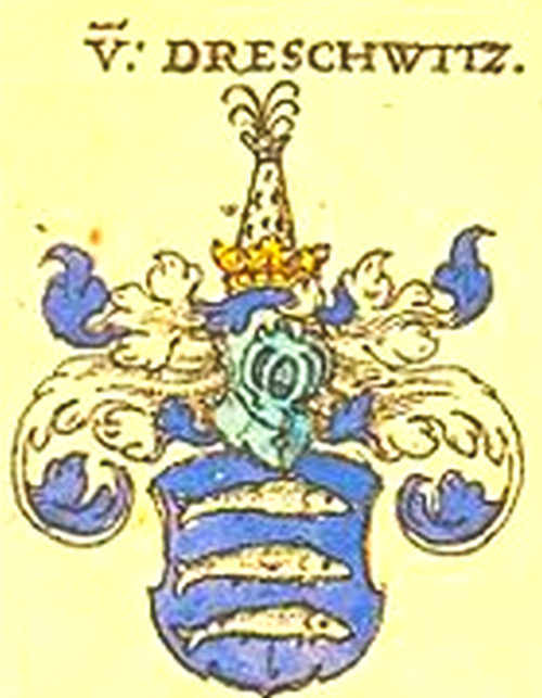 Wappen der Dreswitzer